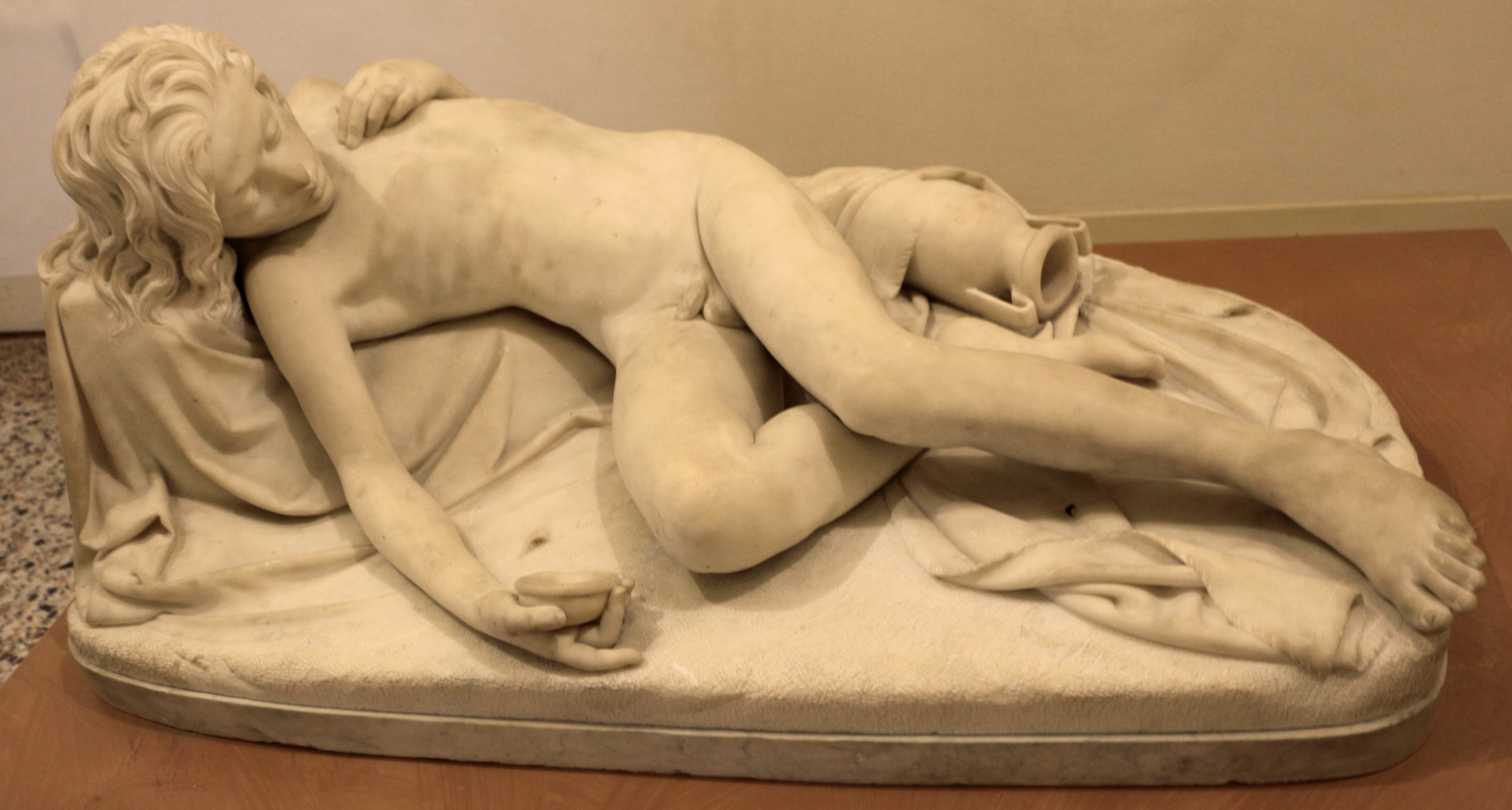 Villa Reale di Milano This is a photo of a monument which is part of cultural heritage of Italy.